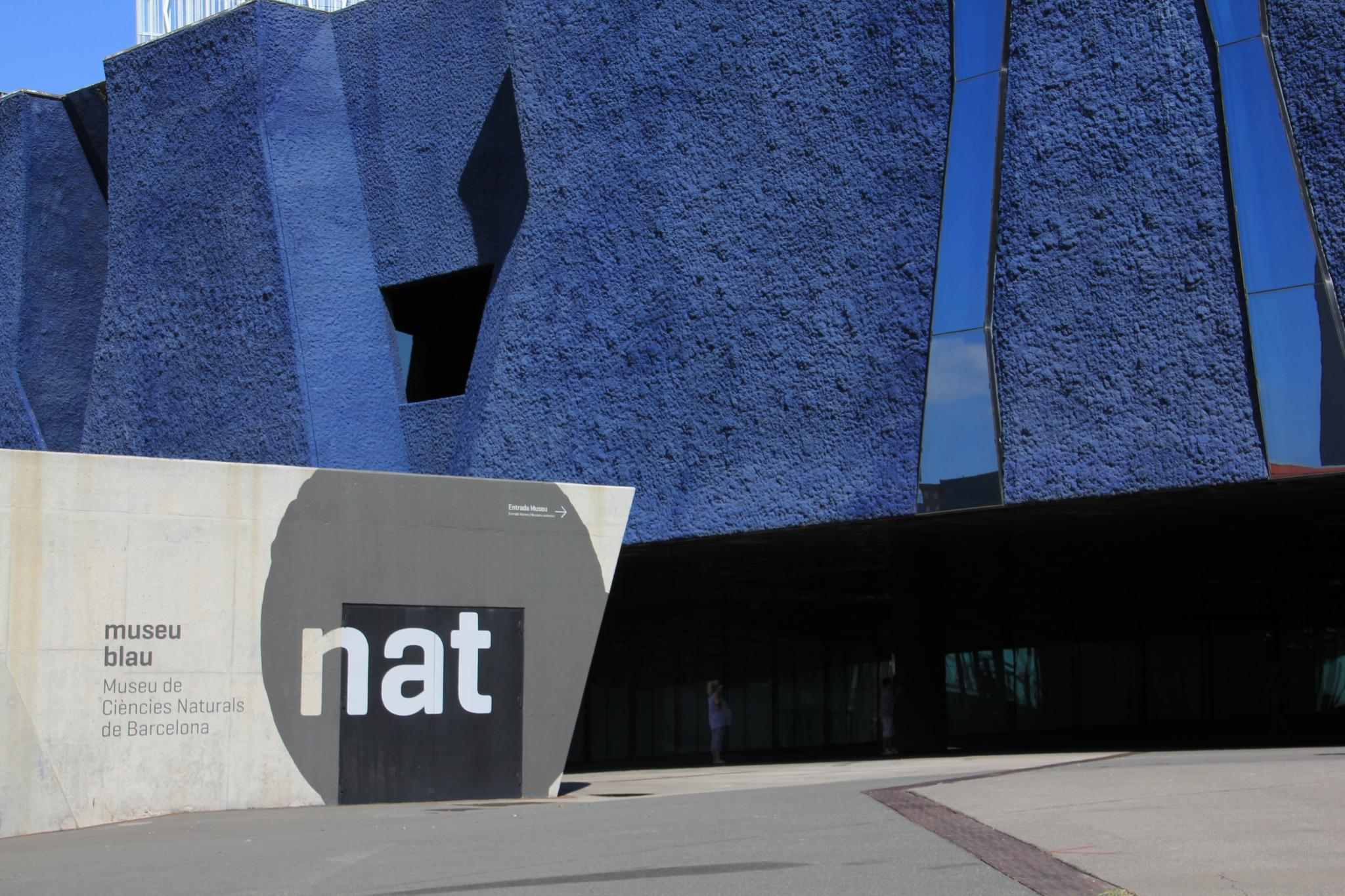 Edificio Fórum, sede, desde marzo de 2011, del Museo de Ciencias Naturales, también conocido como "Museu Blau" (Museo Azul).